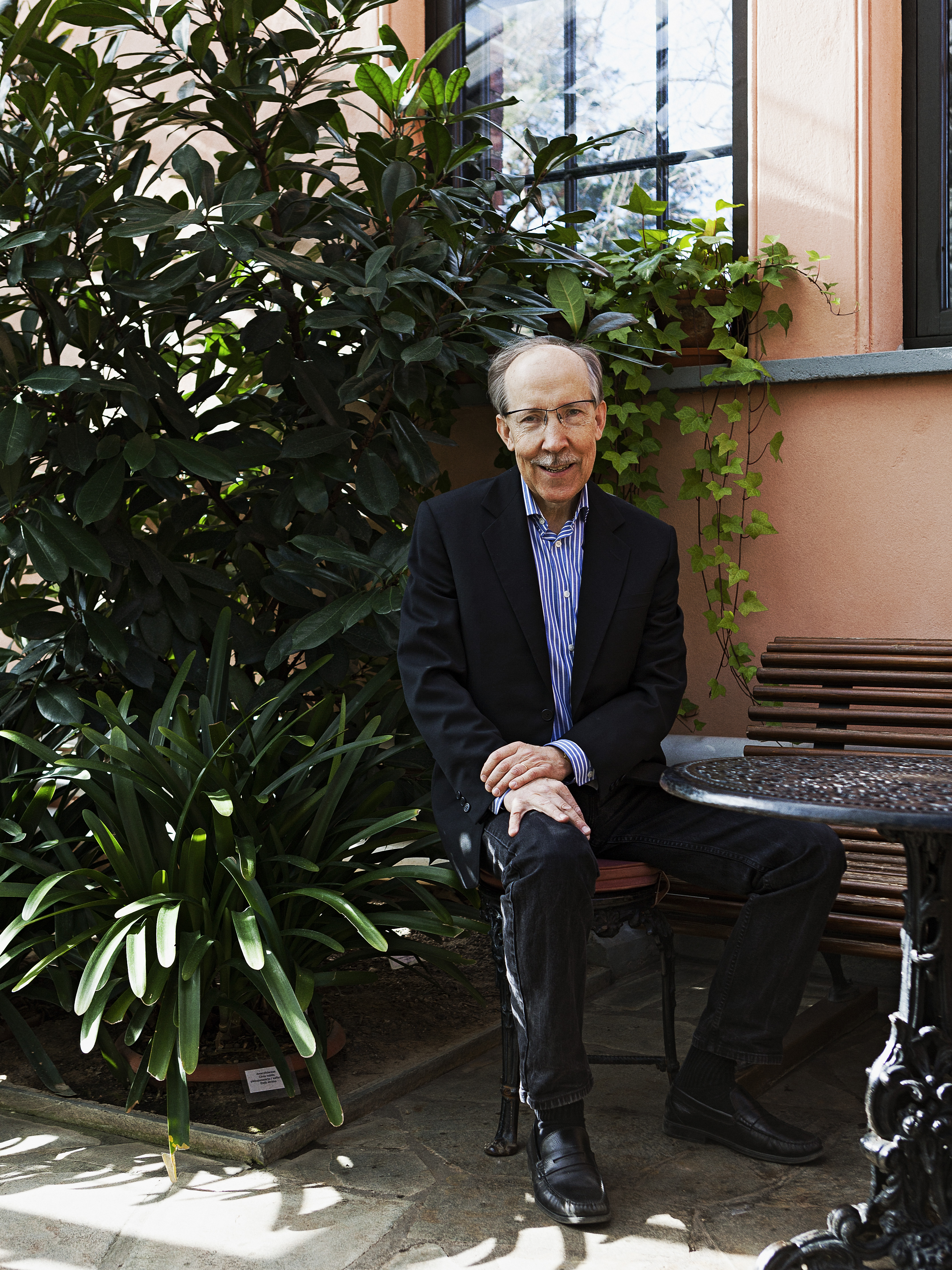 Kari Alitalo, Academiehoogleraar moleculaire biologie van kanker aan de Universiteit van Helsinki (Finland), krijgt de Dr. A.H. Heinekenprijs voor Geneeskunde 2014 voor zijn pionierswerk in het onderzoek naar hoe en wanneer lymfe- en bloedvatstelsels groeien, en hoe die kennis kan helpen bij het behandelen van kanker en andere ziekten. Bij gebruik van de foto's is naamsvermelding van de fotograaf verplicht: Jussi Puikkonen/KNAW.